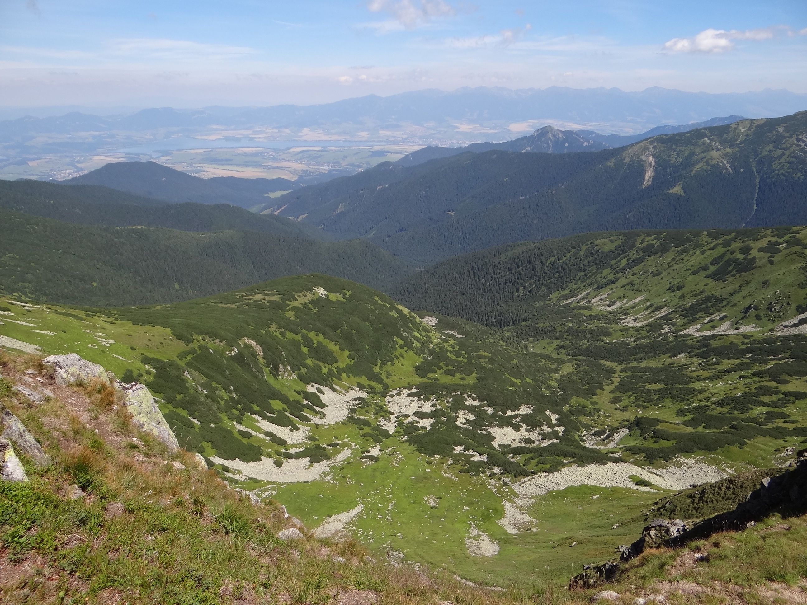 Krížska dolina